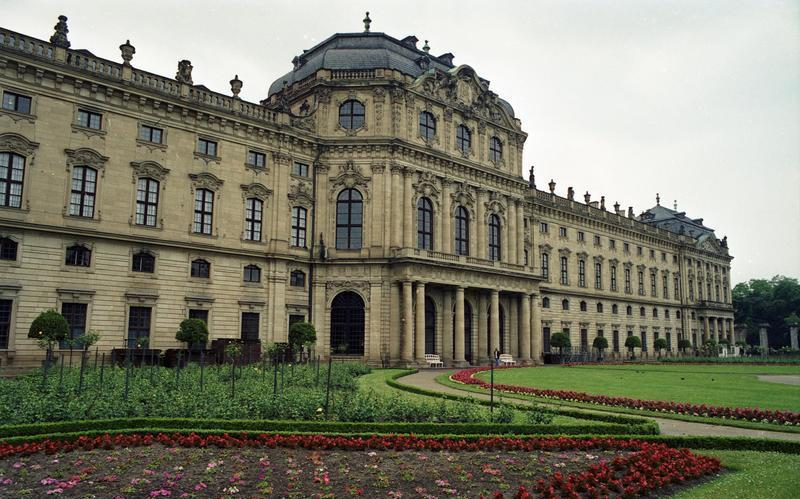 Juni 1988 Würzburg Residenz